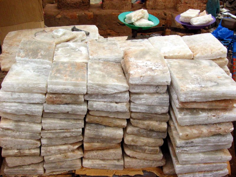 Placas de sal en Tombuctú. Bloques de sal.